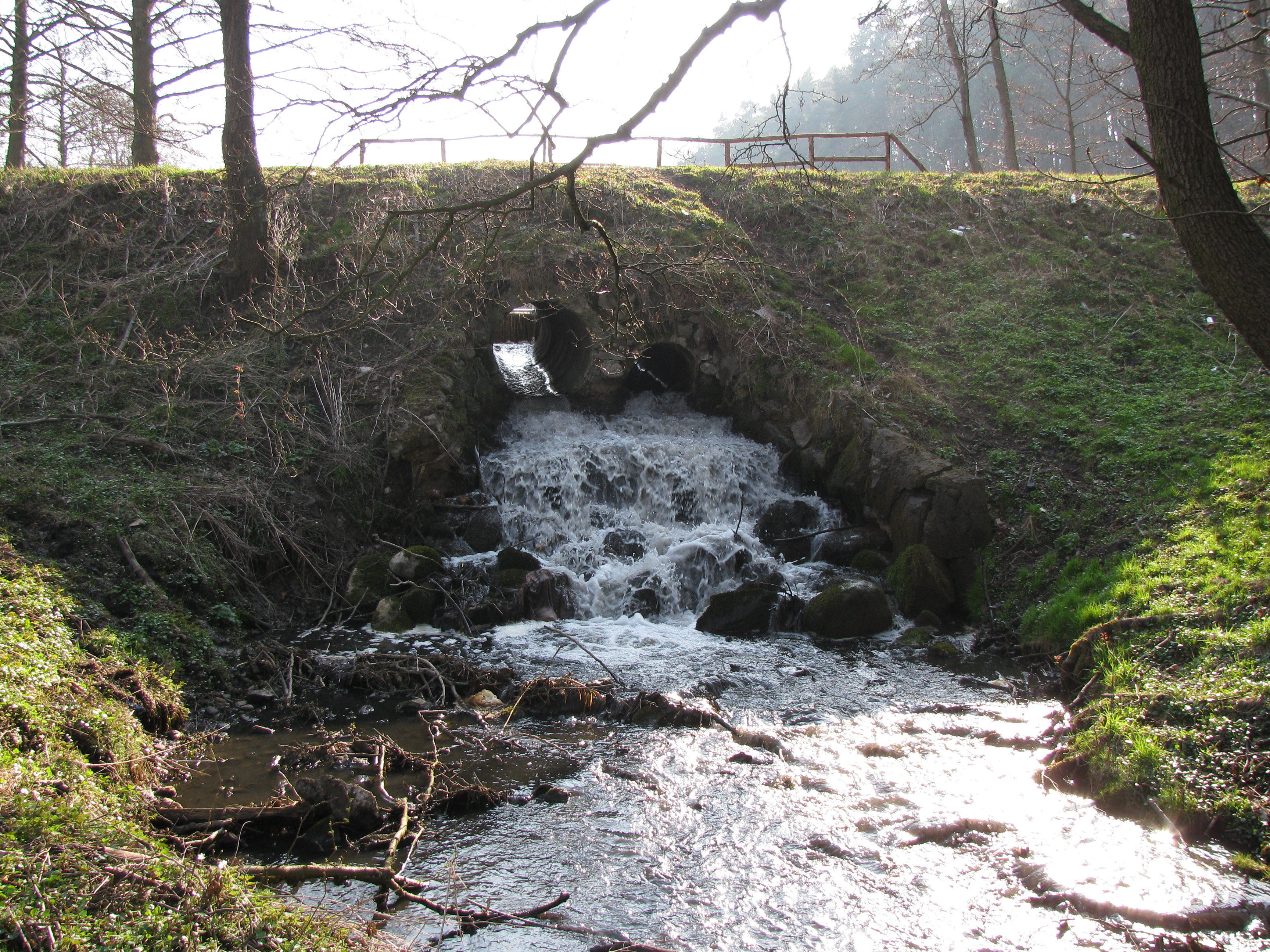 Dolina Radości w Oliwie. Potok.